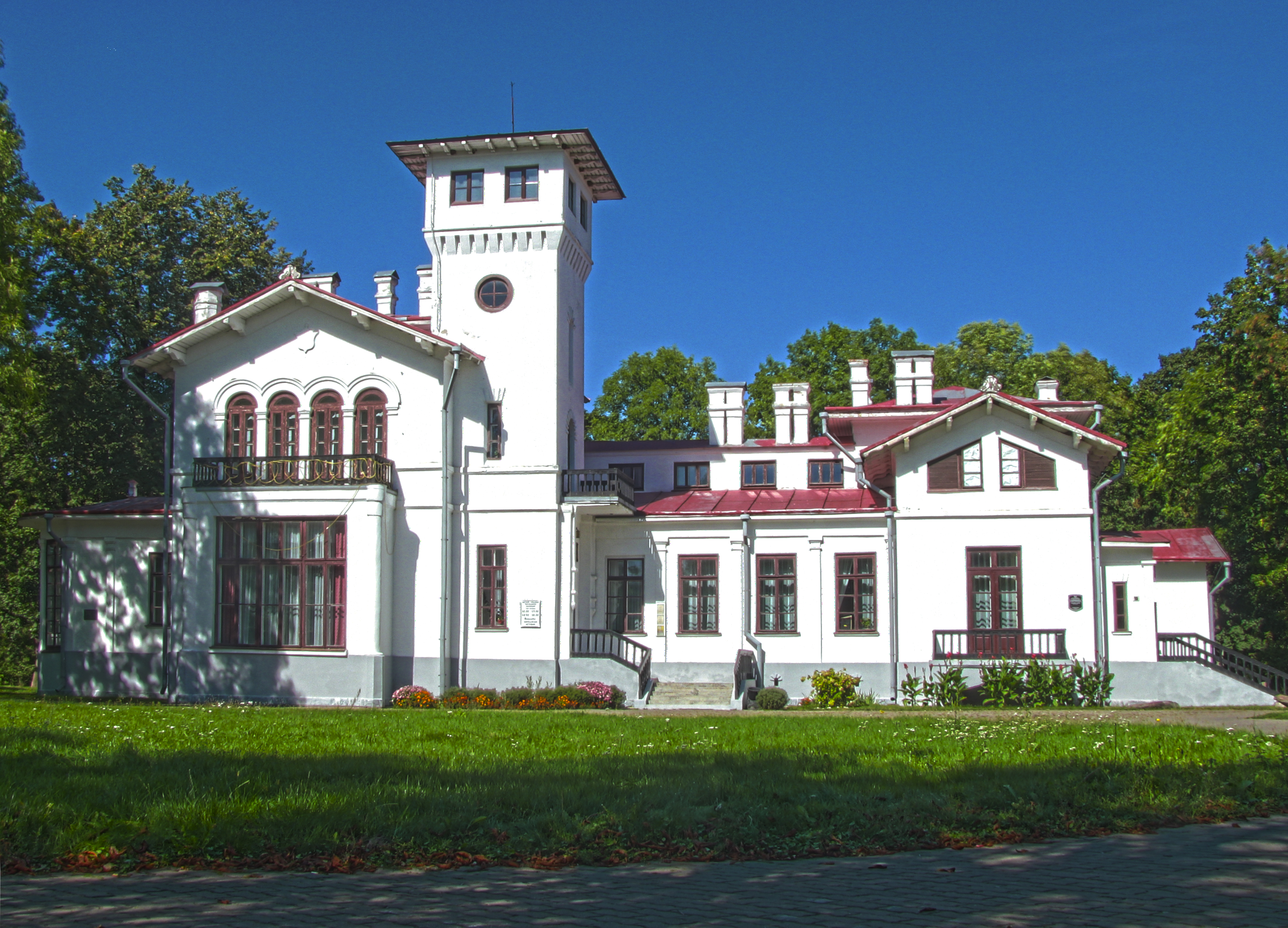 Беларуская (тарашкевіца): Будынкі былой гарадзкой сядзібы: сядзібны дом, флігель. г. Пружаны This is a photo of Belarusian heritage monument. Reference number: 112Г000585 ( WLM)